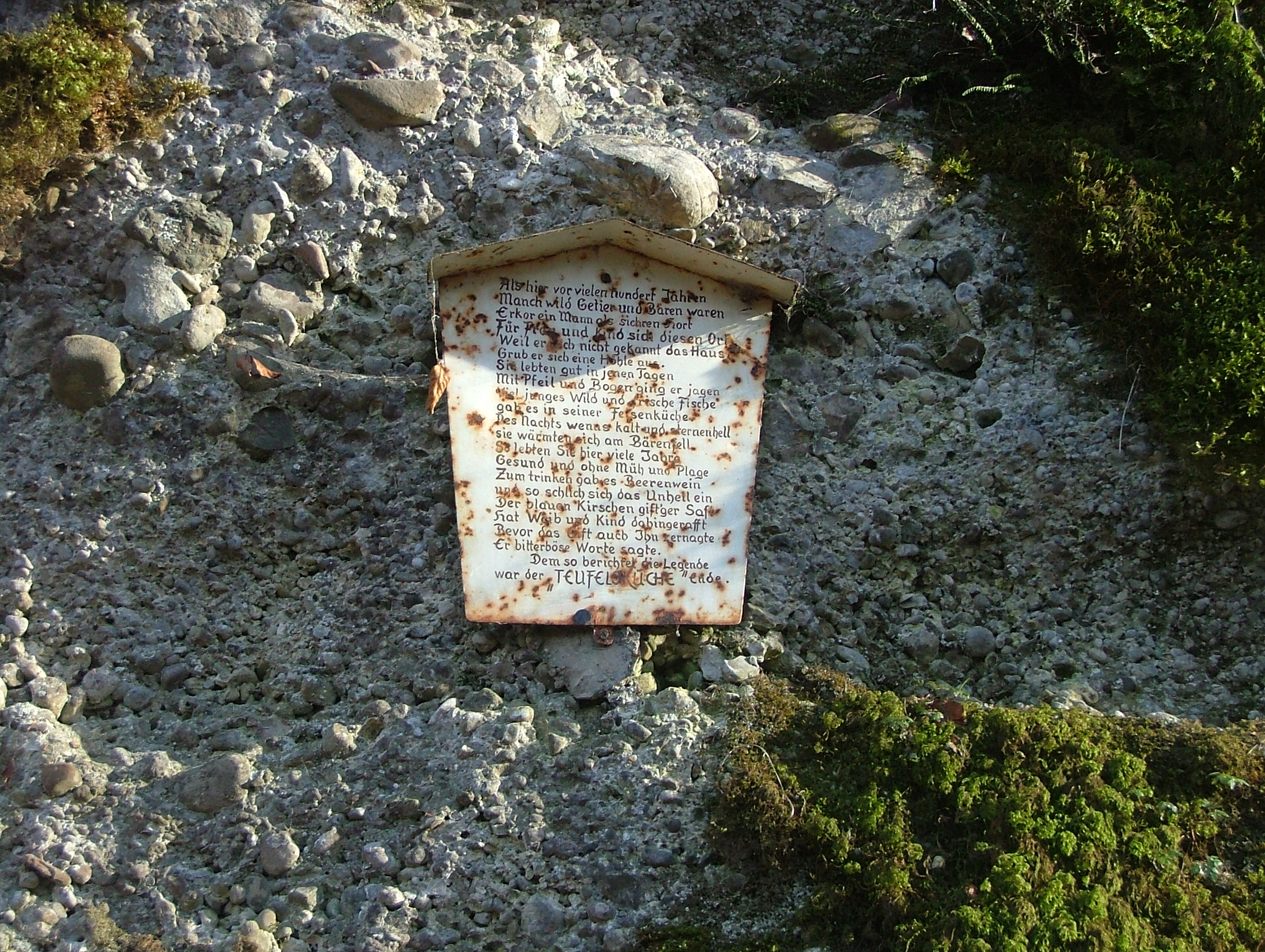 Ronsberg